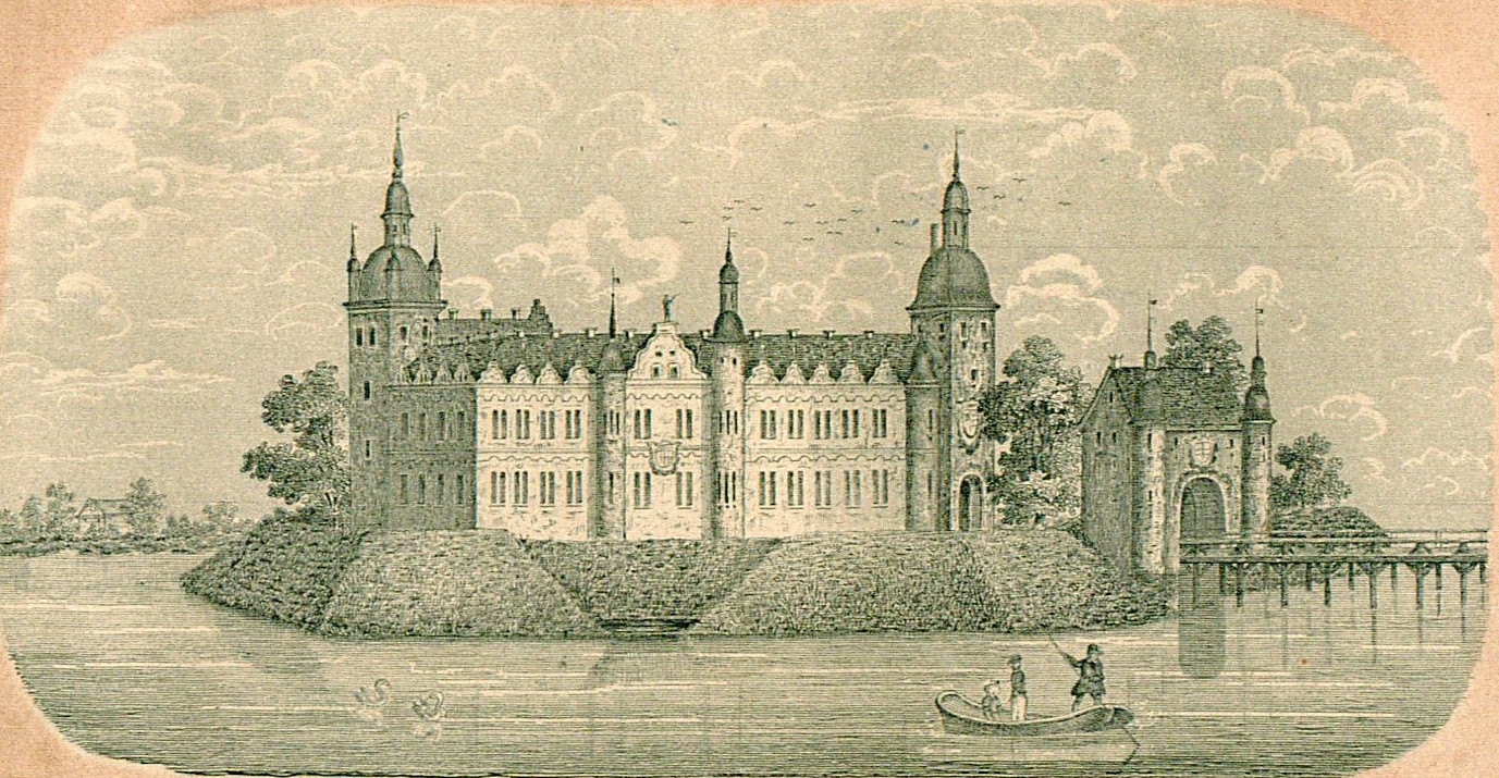 Das ehemalige reichsgräfliche Schloss Eden bei Rietberg